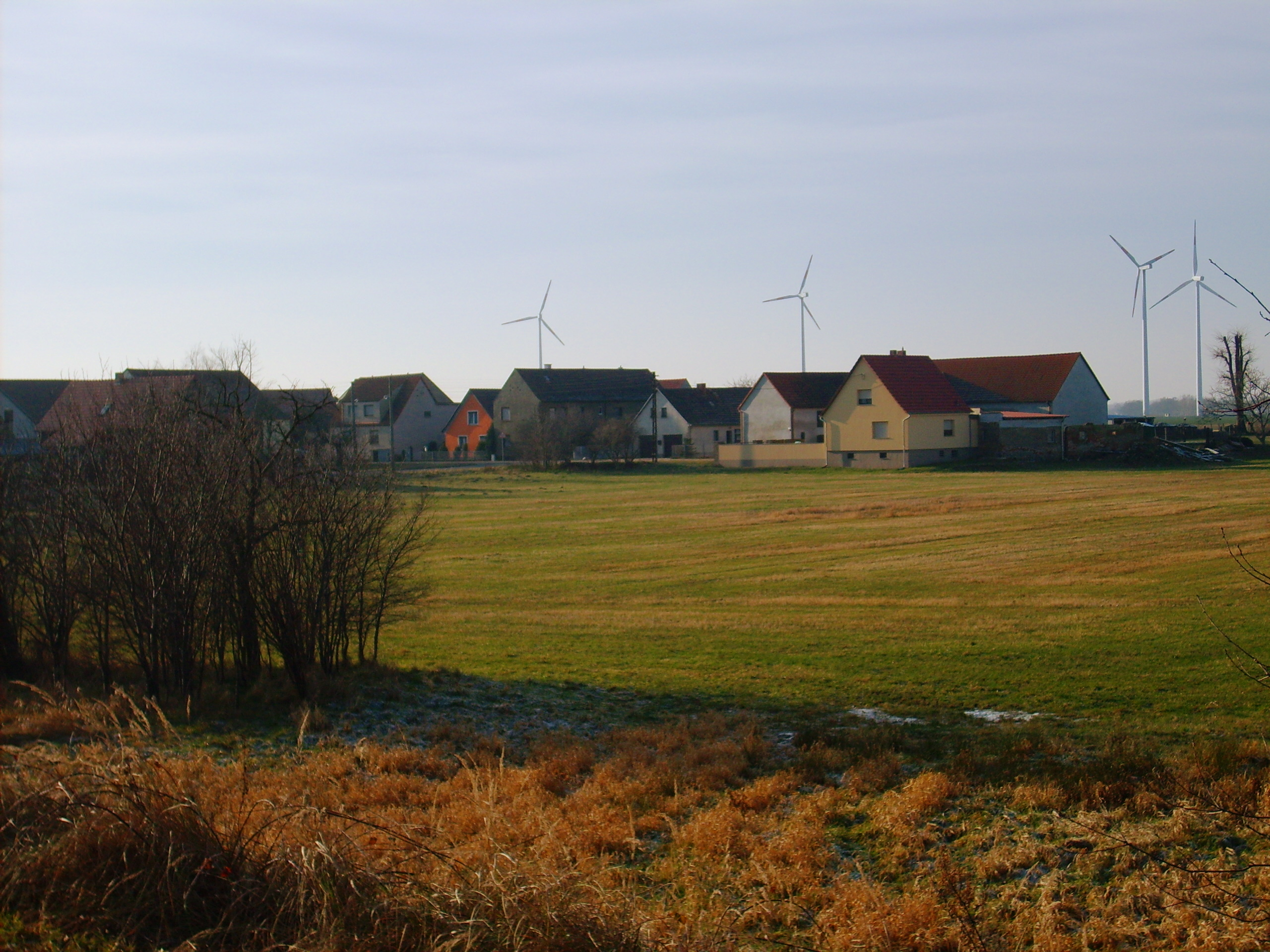 Ortsteil Kotschka von Elsterwerda